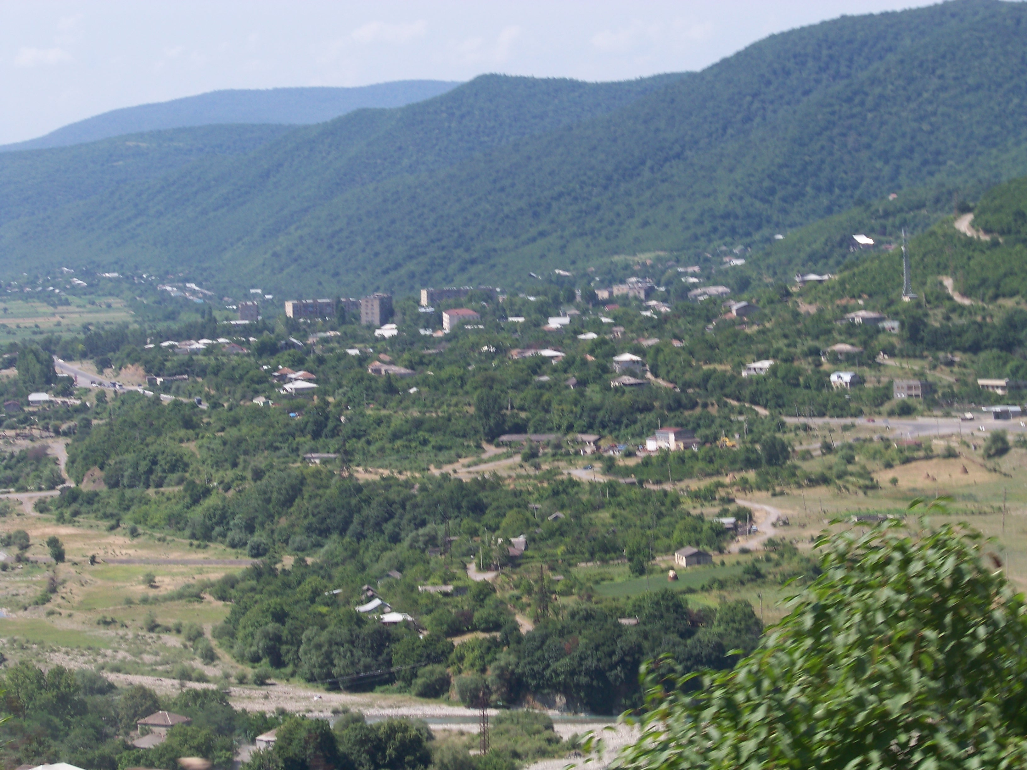 დაბა ჟინვალი